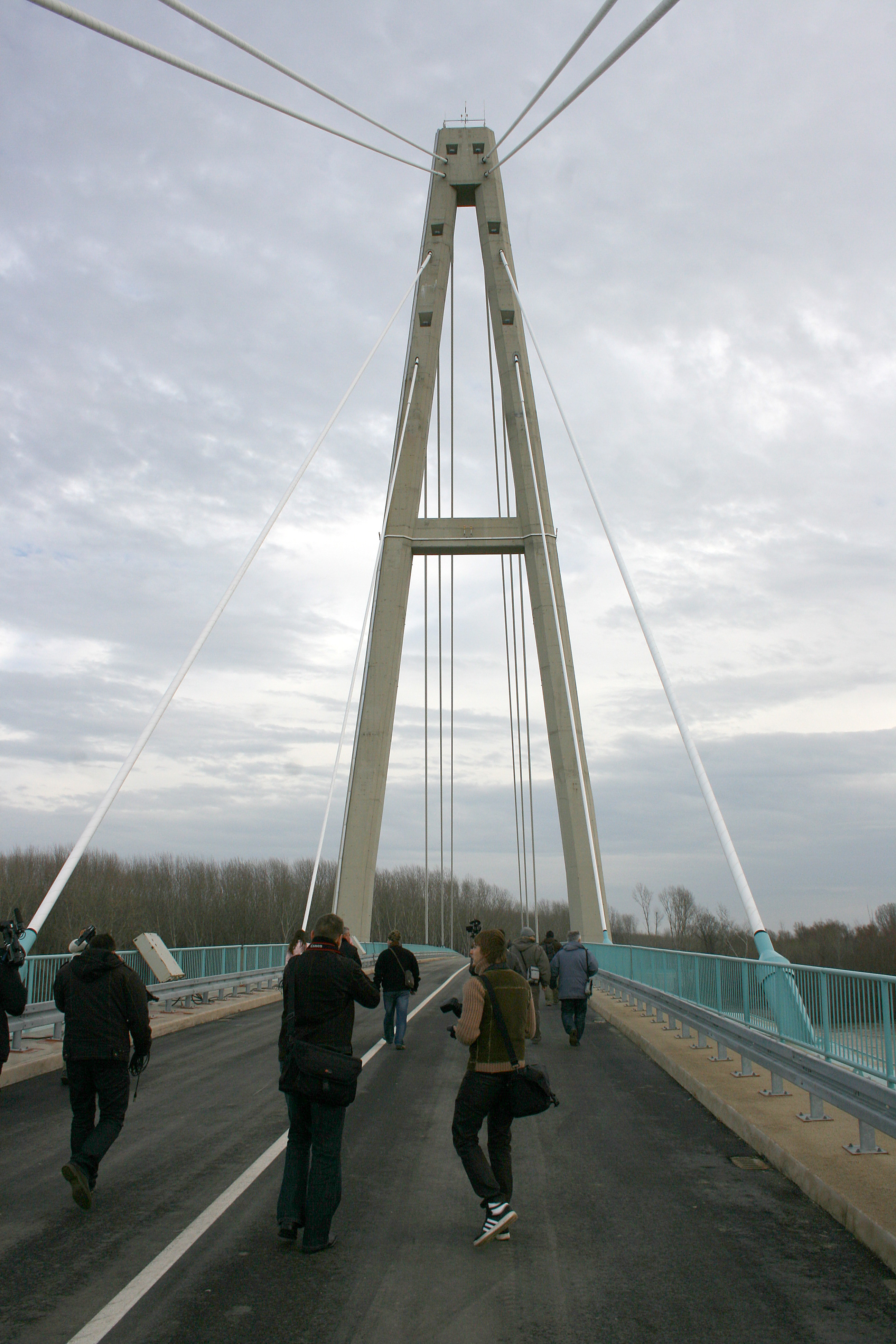 Мост преко Тисе у Ади, Србија.